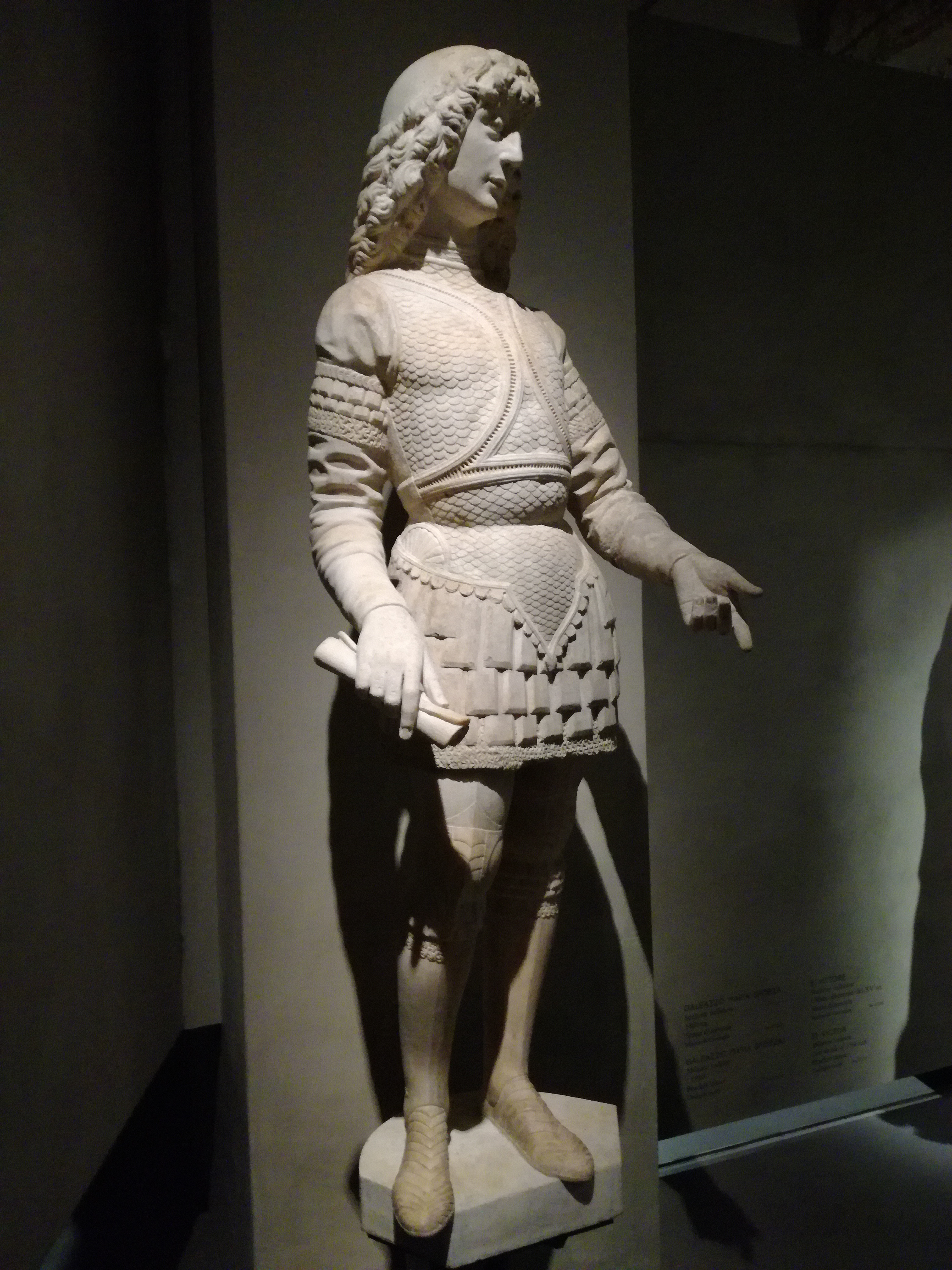 Galeazzo Maria Sforza, Proveniente dalla zona absidale della cattedrale. il Nebbia la identifica come una scultura della fine del 1400 di mano dell'Amadeo